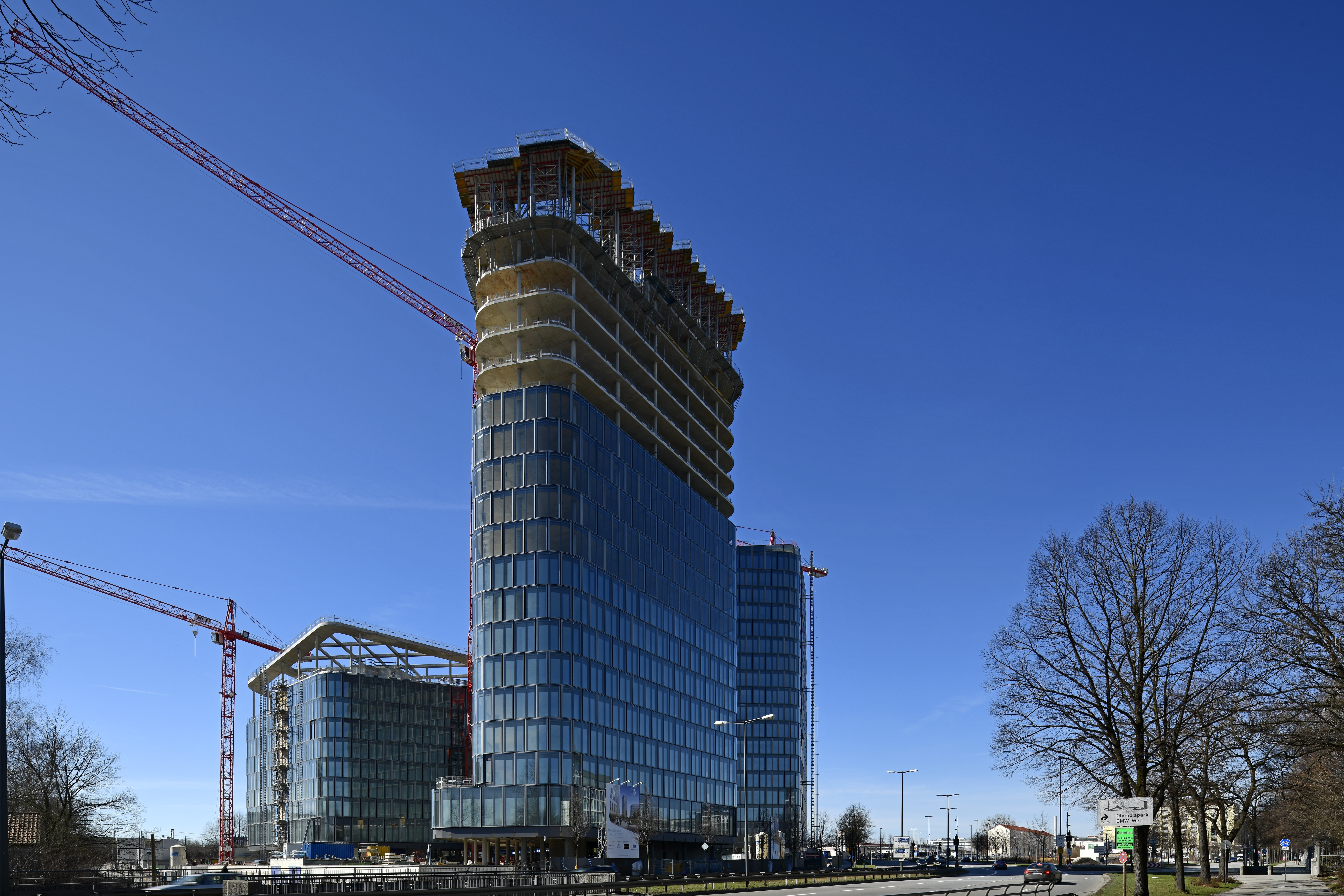 München, Steinhausen. Weiteres entstehen der Trostlosigkeit in München.